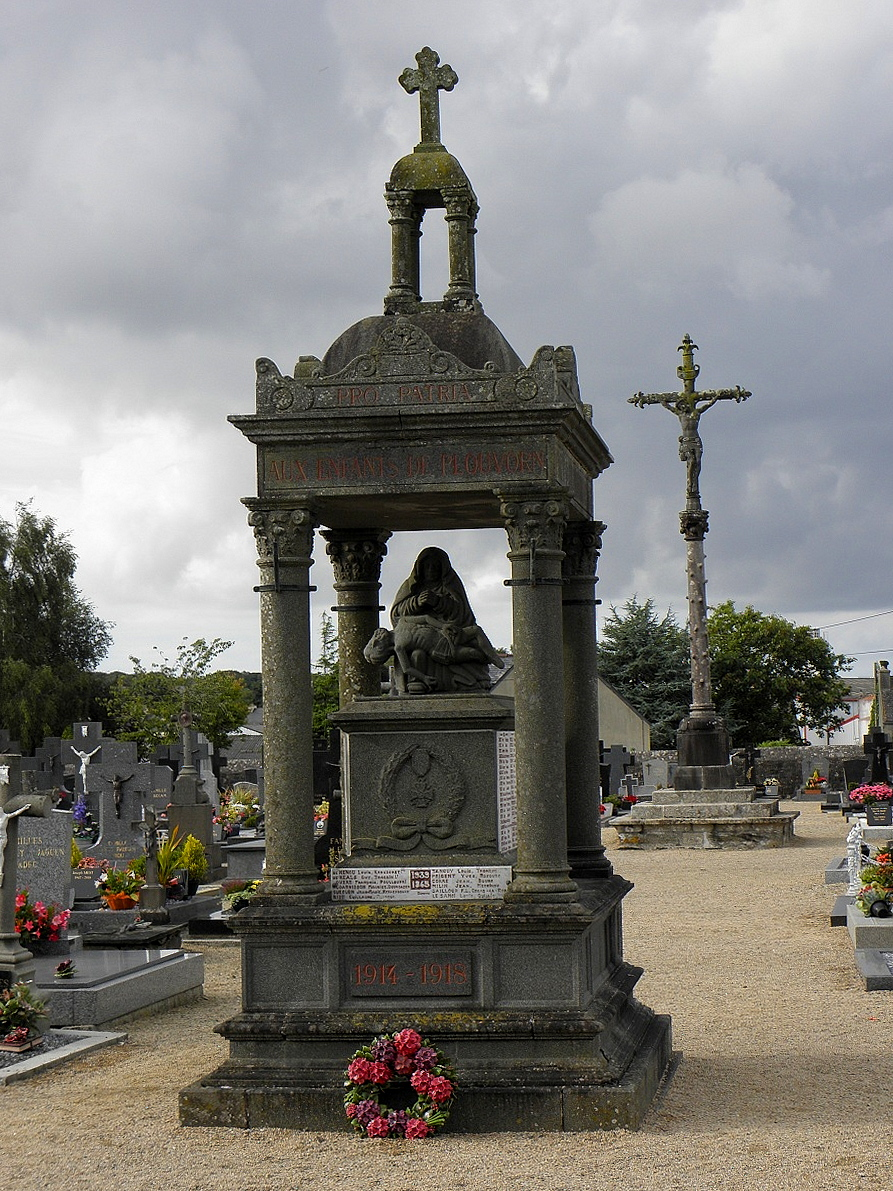 Monument aux morts de Plouvorn (29).